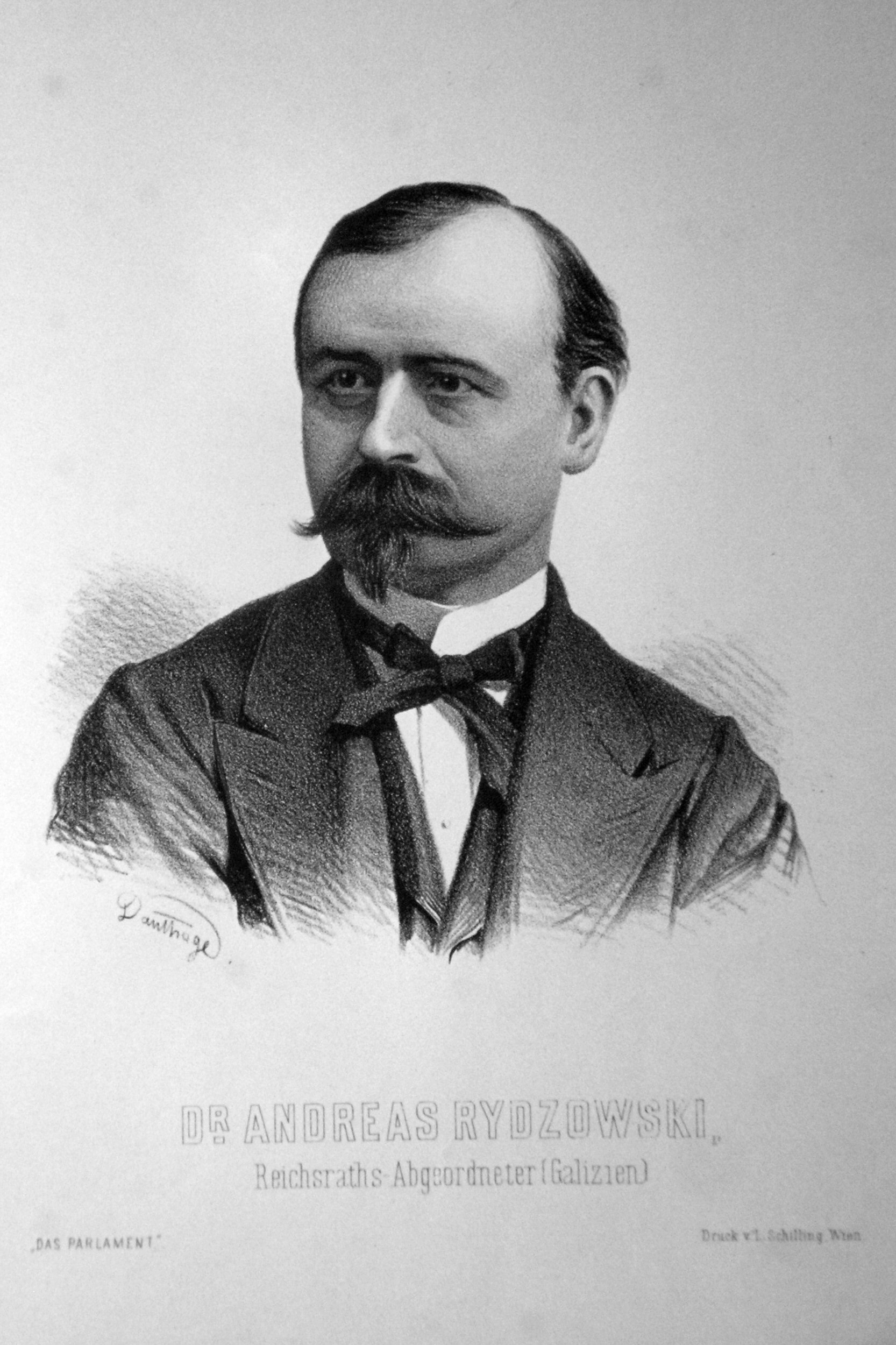 Dr.Andreas Rydzowski( geb. 1829), Rechtsanwalt, Reichsratabvgeordneter für Galizien. Lithographie von Adolf Dauthage, ca 1880